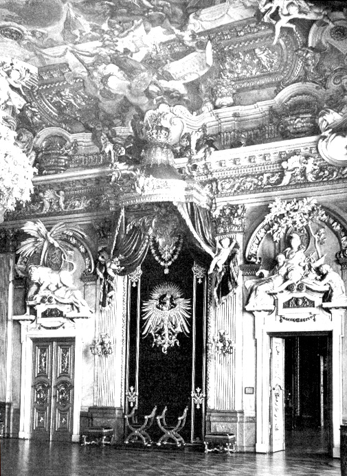 Rittersaal (Schlüter)